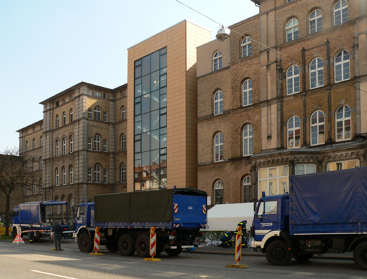 Errichtung einer erweiterten Notaufnahme wegen Covid 19 durch das THW